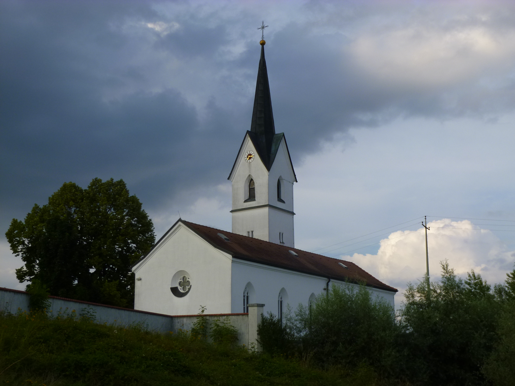 Die kleine Kirche St. Martin in Reibersdorf liegt in der Ortsmitte - am Donau-Radweg und am Donaudamm (Hochwasserschutz). Sie ist von einem Friedhof umgeben und gehört zum Gemeindegebiet von Parkstetten im Landkreis Straubing-Bogen.This is a photograph of an architectural monument.